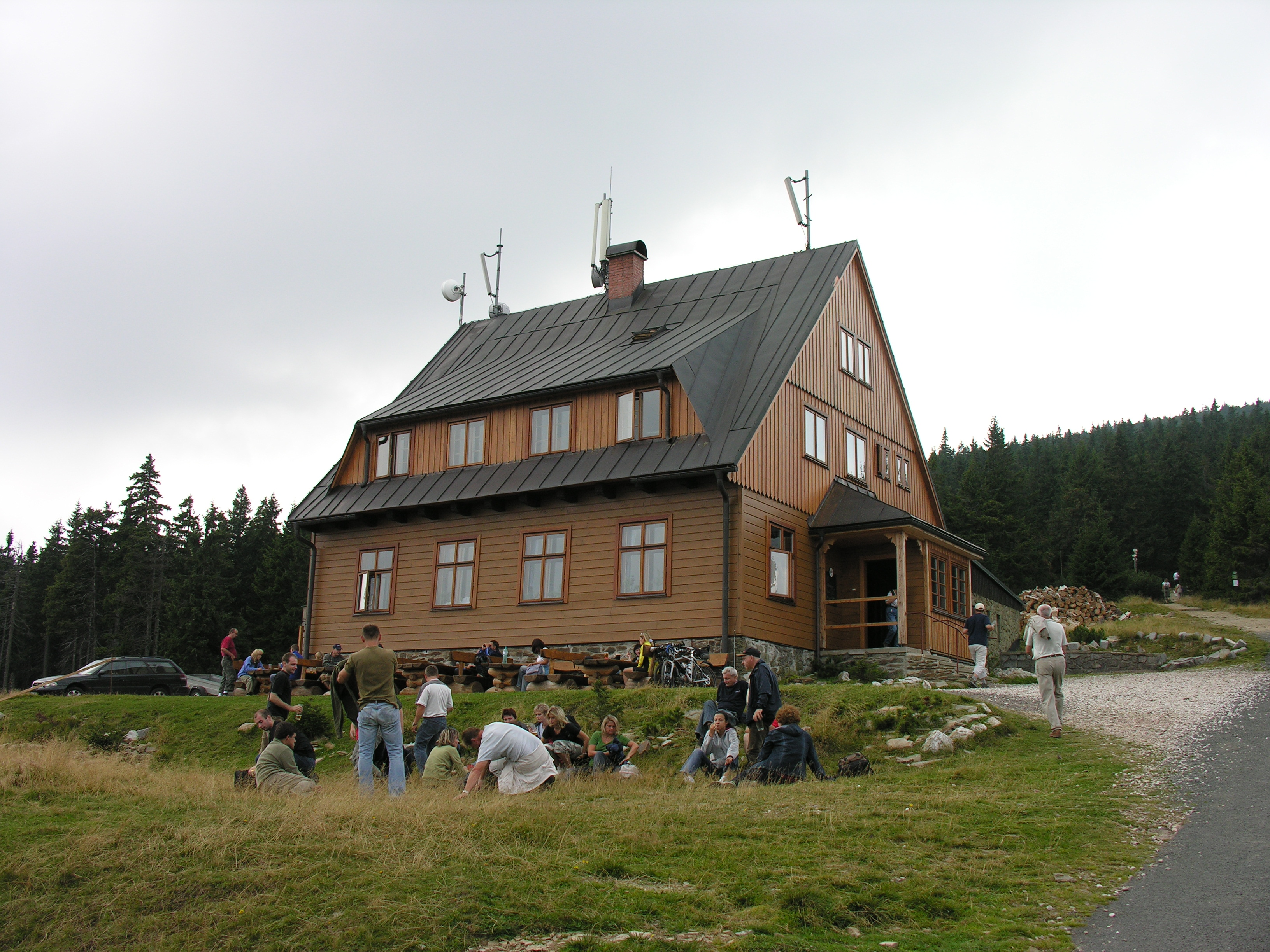 Schronisko Jelenka w Karkonoszach